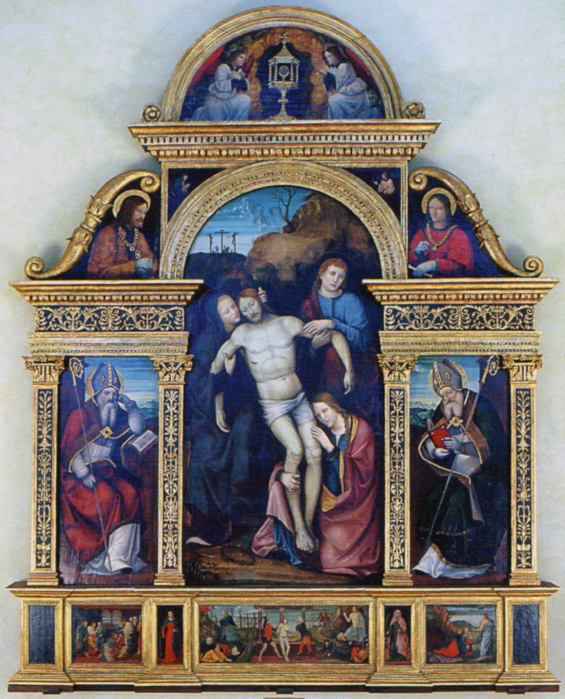 Polittico della deposizione (paolo da caylina il giovane)